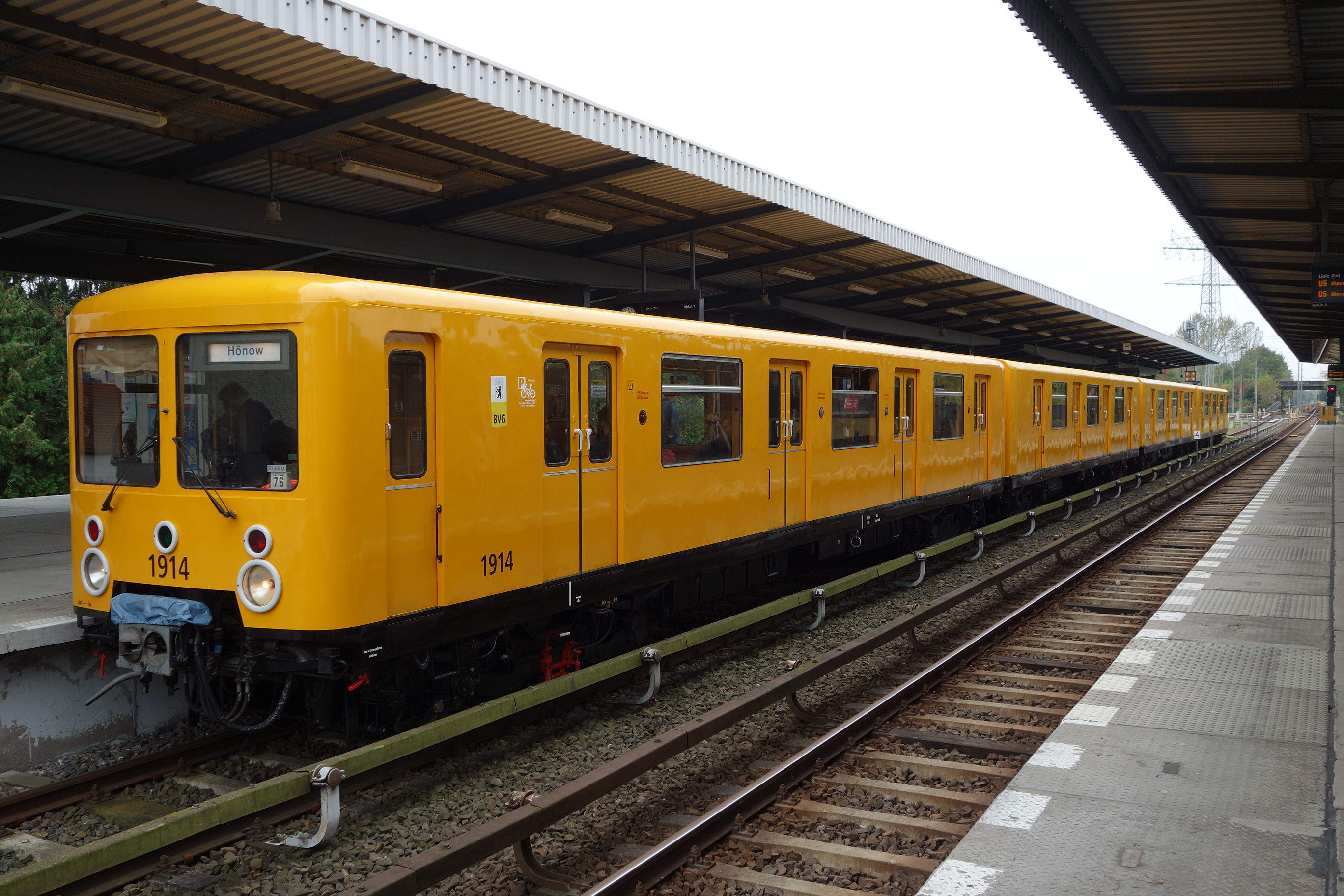 Berliner U-Bahn-Zug der Baureihe EIII im U-Bahnhof Biesdorf-Süd während des IGA-Einsatzes